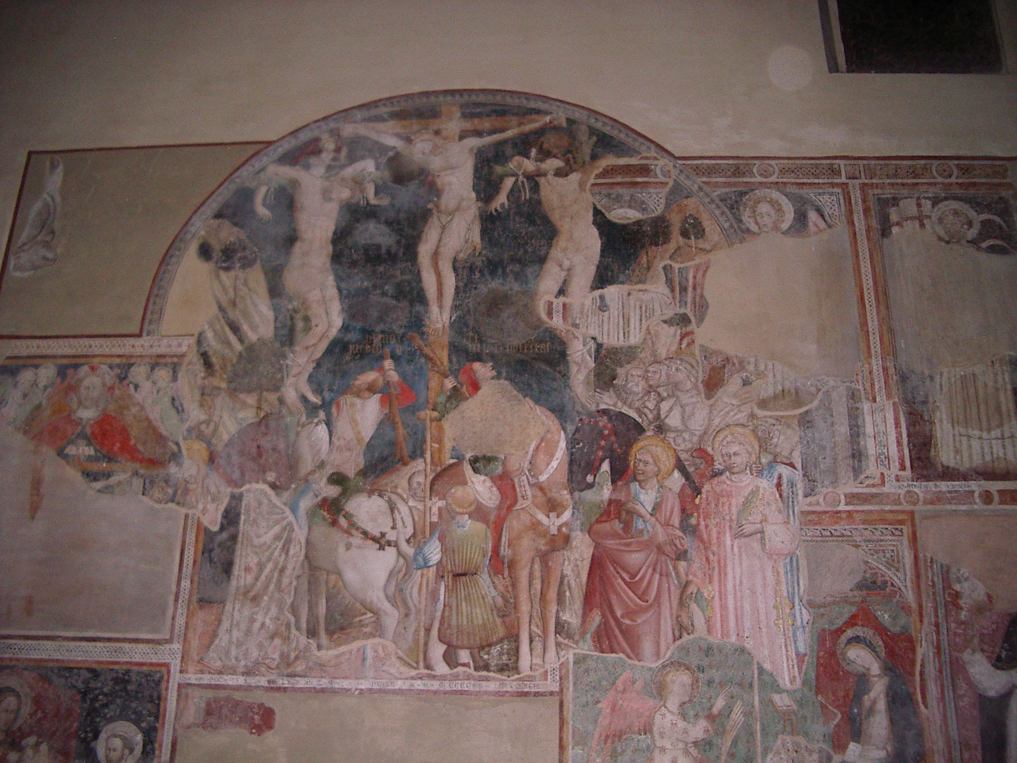 Fresque Crucifixion et une Annonciation et Saints de l'école ombrienne du XIVe siècle,église san Domenico Città di Castello, Ombrie Italie